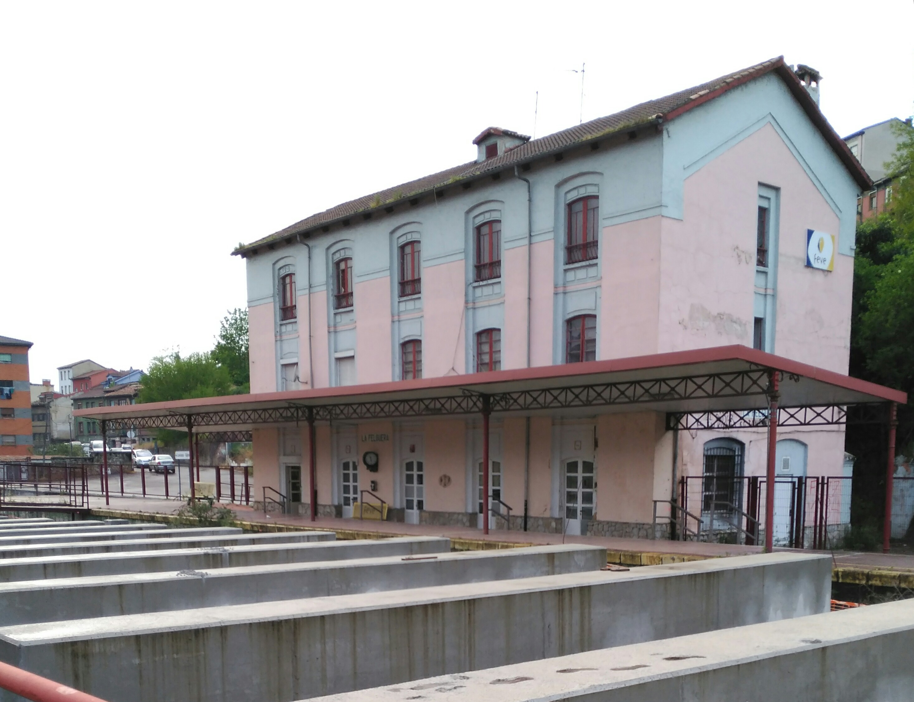 Estación de La Felguera-Vega (Asturias) de la línea FEVE-RENFE